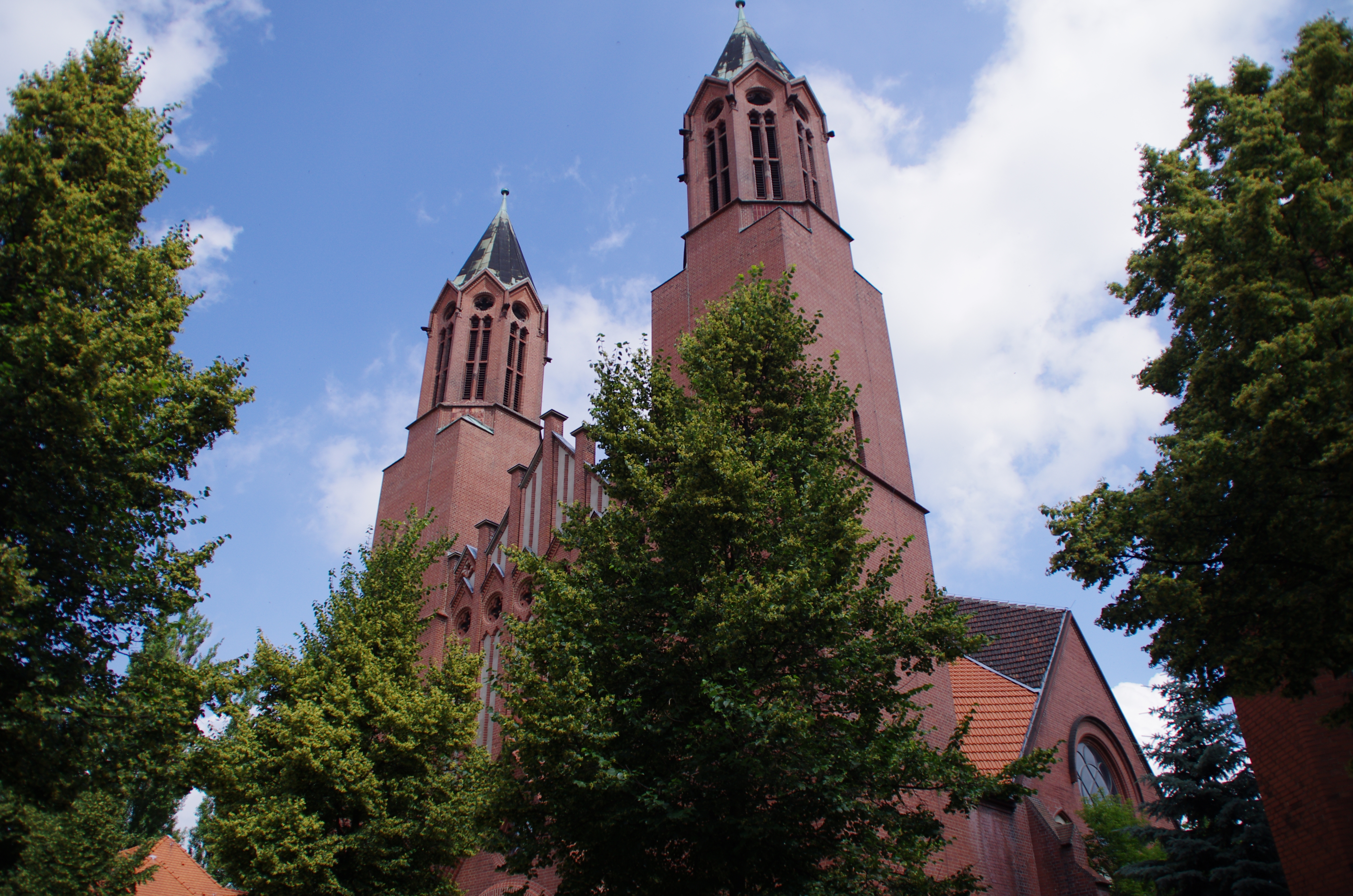 Luckenwalde in Brandenburg. Die katholische Kirche steht unter Denkmalschutz.